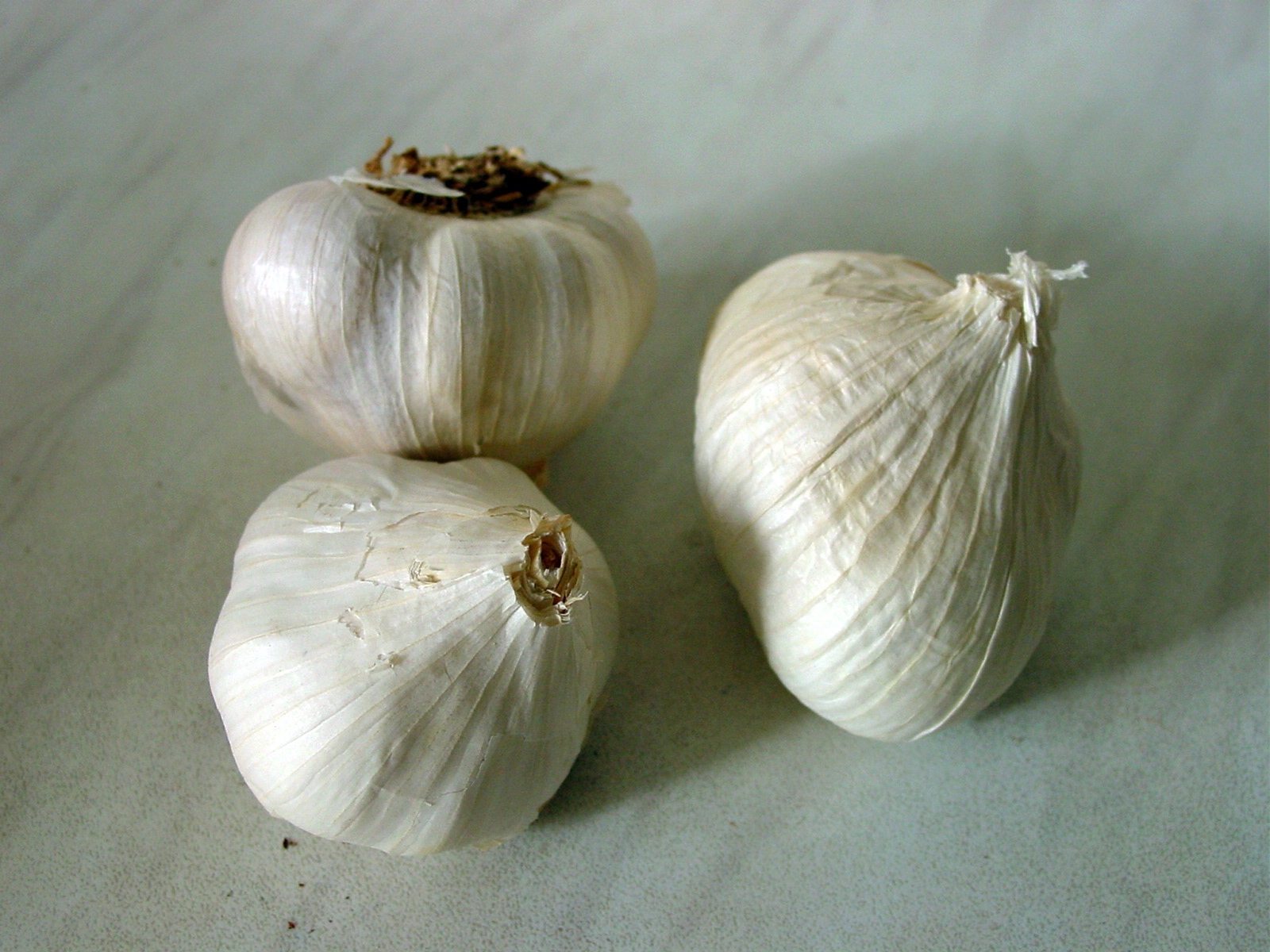 Garlic